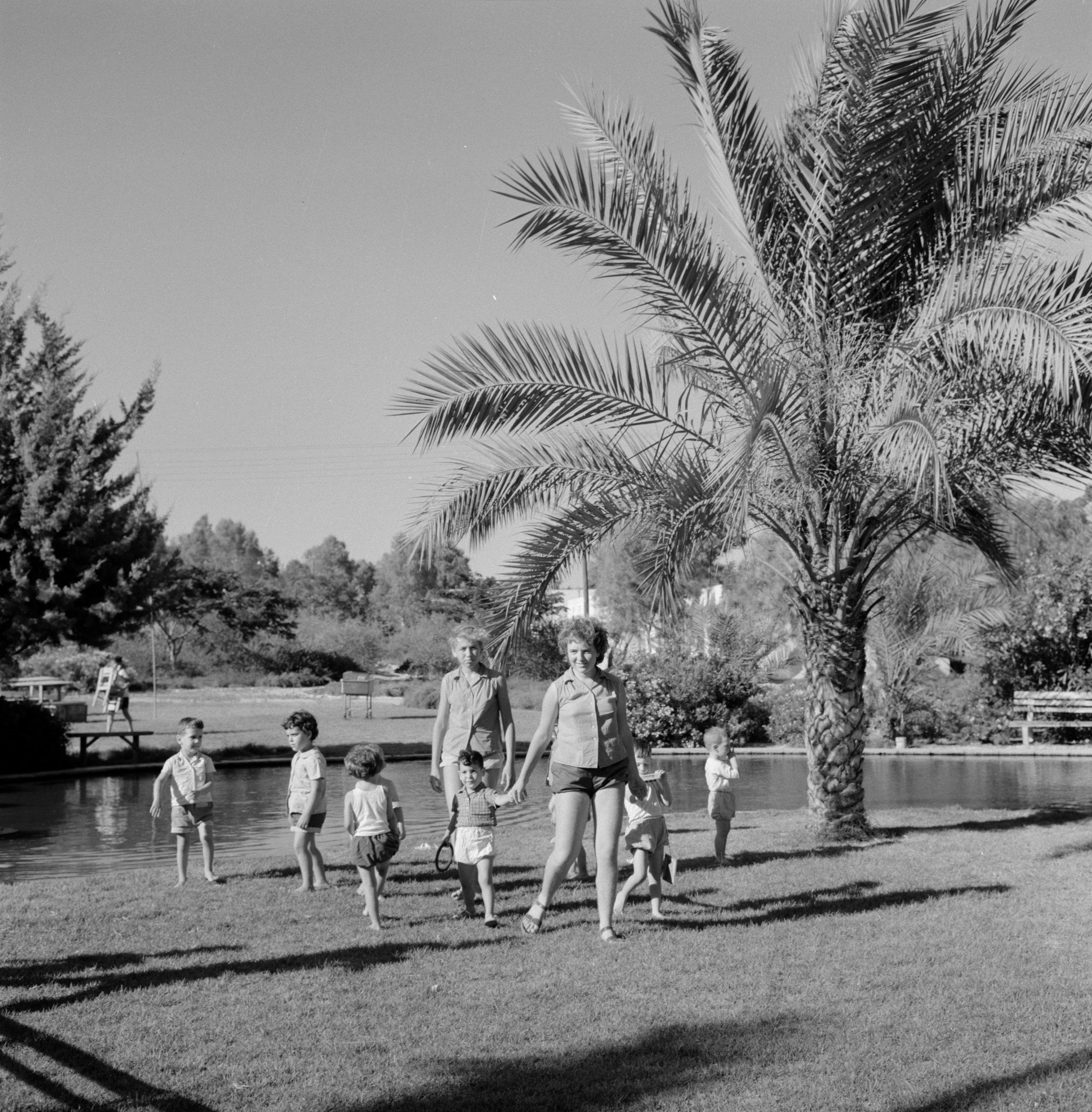 Collectie / Archief : Fotocollectie Van de Poll Reportage / Serie : Israël 1964-1965: kibboets Yad Mordechai Beschrijving : Kibboets Yad Mordechai in het zuidwesten van Israel bij Asjkelon. Volwassenen en kinderen bij een vijver met daarbij een palmboom Annotatie : De kibboets Yad Mordechai is tijdens de onafhankelijkheidsoorlog langdurig beschoten en belegerd door het Egyptische leger, de bewoners hebben zware verliezen geleden maar hebben stand gehouden. De kibboets is genoemd naar de Poolse verzetsstrijder Anielewicz Mordechai Na de oorlog is een bloeiende en moderne kibboets ontstaan. Datum : 1 januari 1967 Locatie : Asjkelon, Israël, yad mordechai Trefwoorden : bomen, kibboetsen, kinderen, palmbomen, vijvers, vrijetijdsbesteding Persoonsnaam : Anielewicz, Mordechai Fotograaf : Poll, Willem van de, [onbekend] Auteursrechthebbende : Nationaal Archief Materiaalsoort : Negatief (zwart/wit) Nummer archiefinventaris : bekijk toegang 2.24.14.02 Bestanddeelnummer : 255-4176